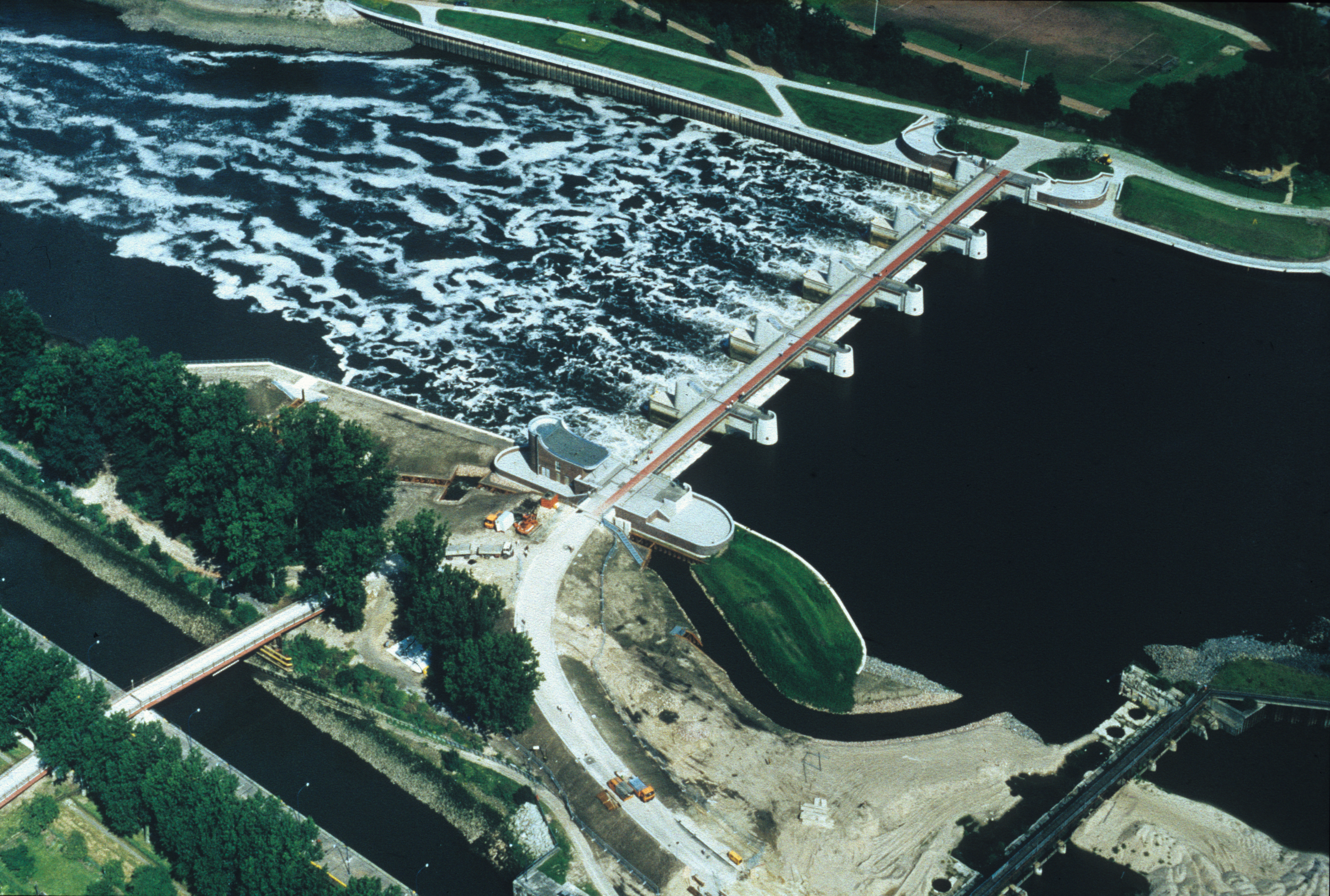 Das Luftbild zeigt das Neue Weserwehr in Bremen-Hemelingen im Betrieb. Alle 5 Wehrverschlüsse sind geöffnet für den Hw-Abfluss